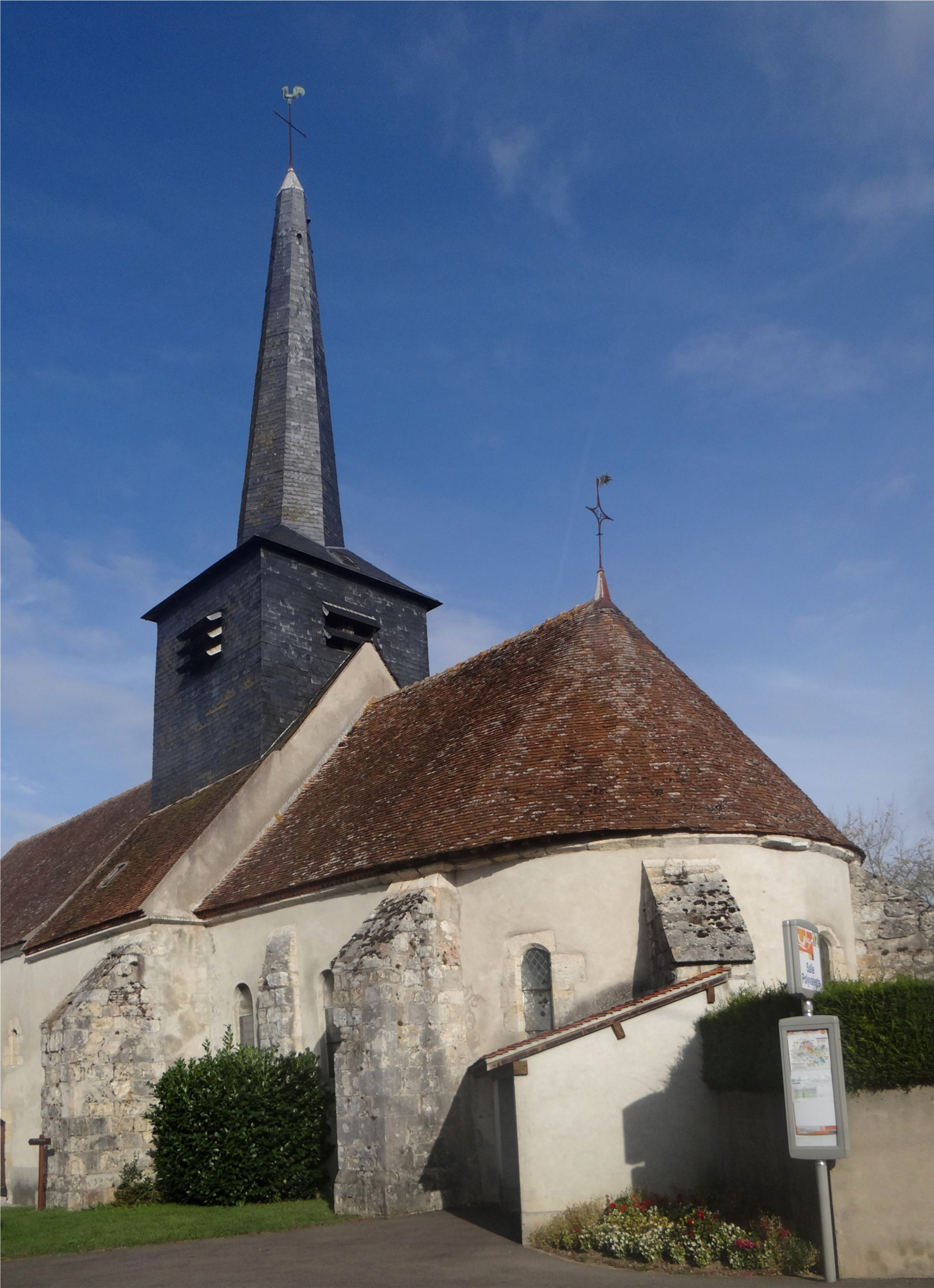 Église Saint-Pierre et Saint-Genou, Noyers, Loiret, France.